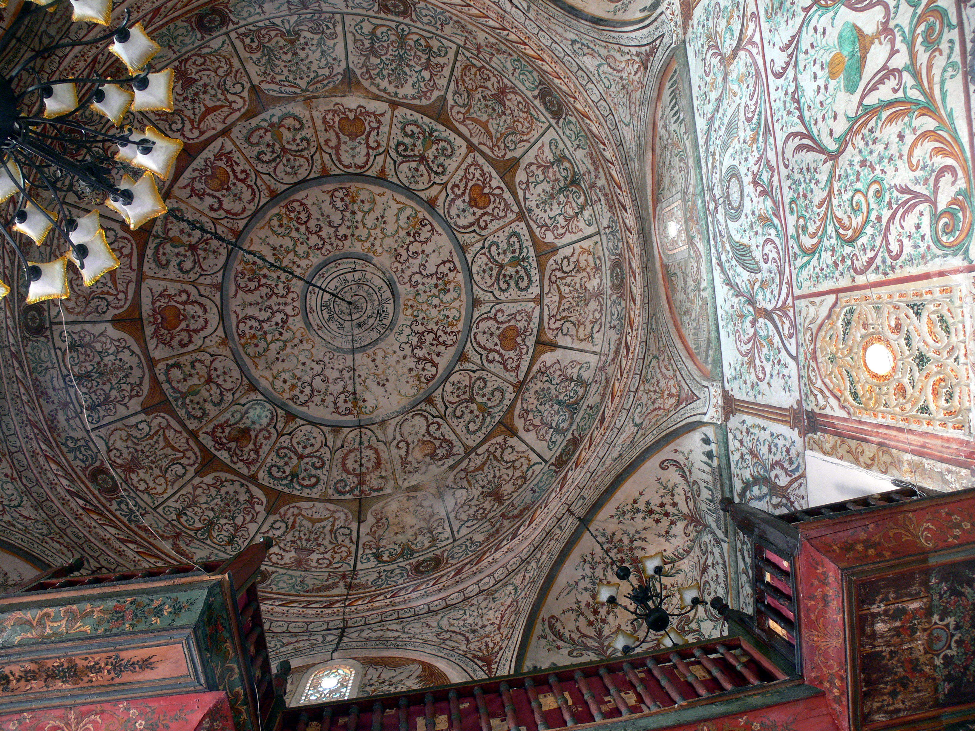 Tirana. Et'hem Beu-Mosque.